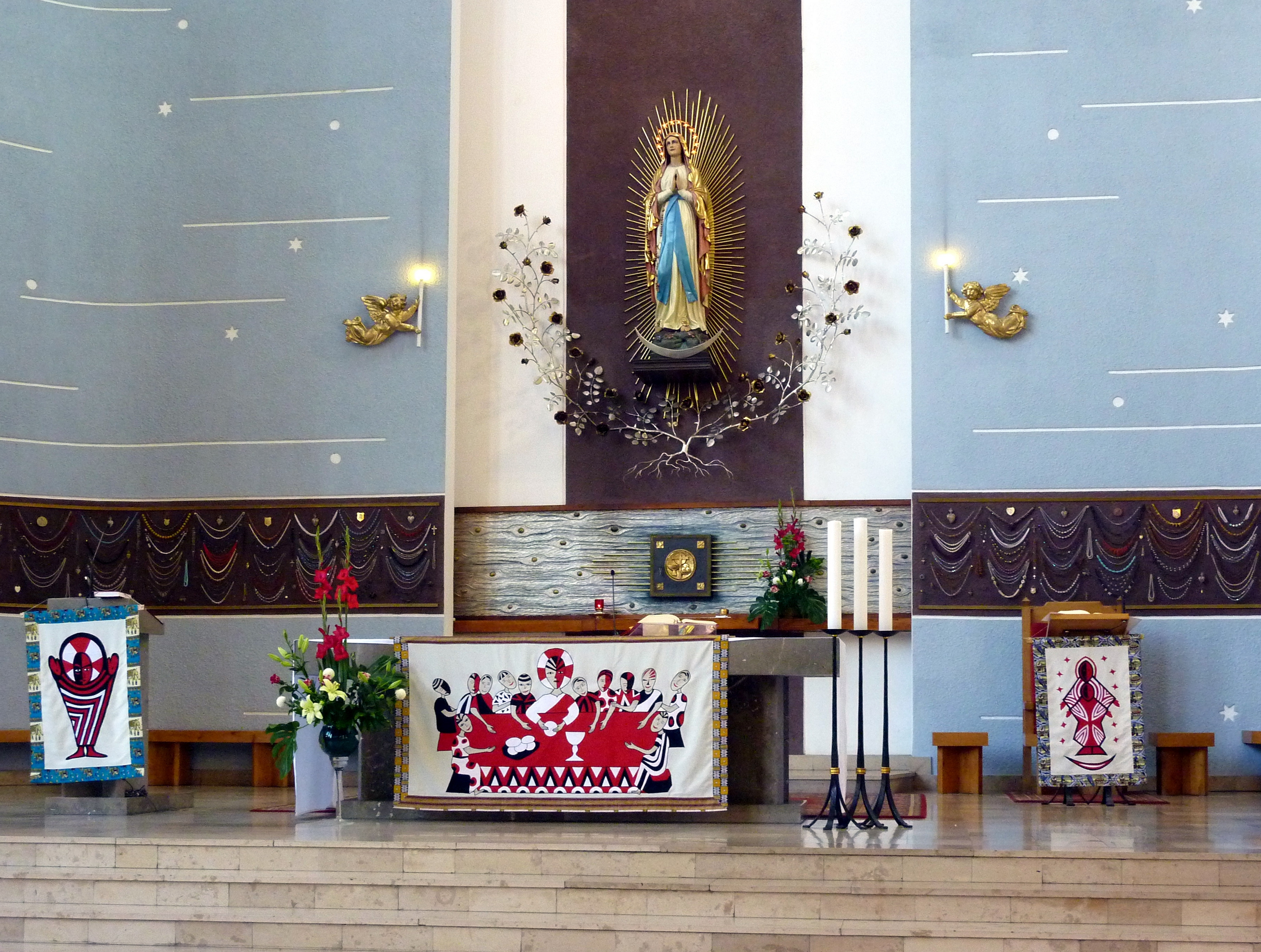 Kościół Matki Bożej z Lourdes w Warszawie.